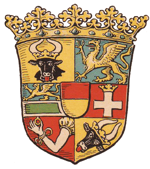 Wappen des Freistaates Mecklenburg-Schwerin zur Zeit der Weimarer Republik.